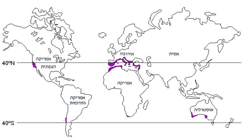 שרטוט מפת אקלים ים-תיכוני. based on image:Medclim.png